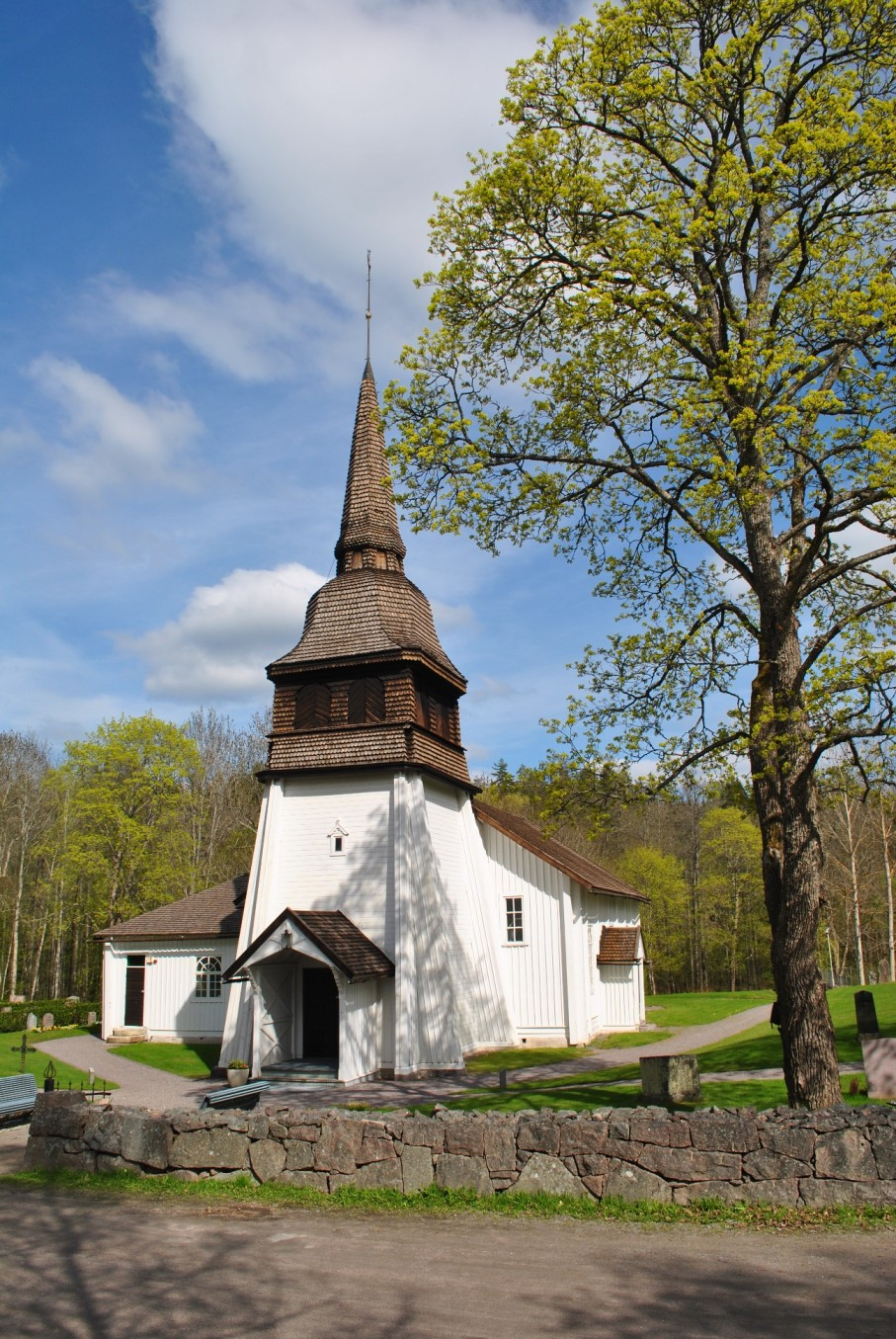 Kyrkan i Simonstorp 2010